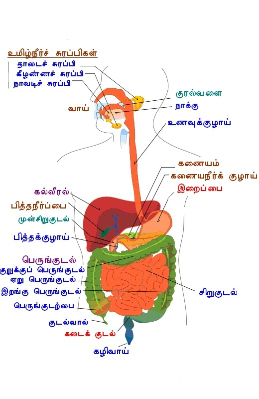 Modified from: பகுப்பு:தமிழில் விளக்க வரைபடங்கள்